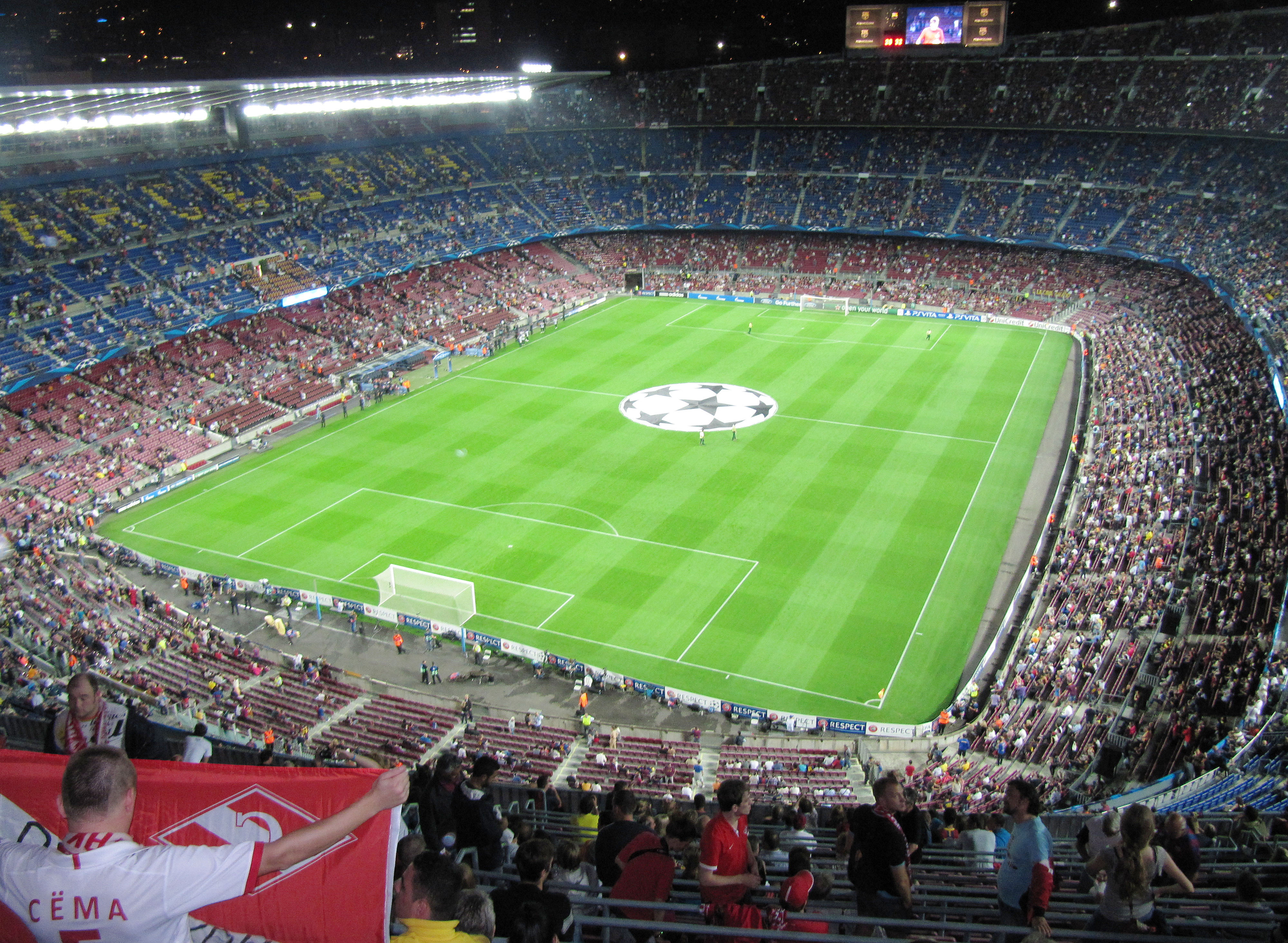 Барселона (Испания) Стадион